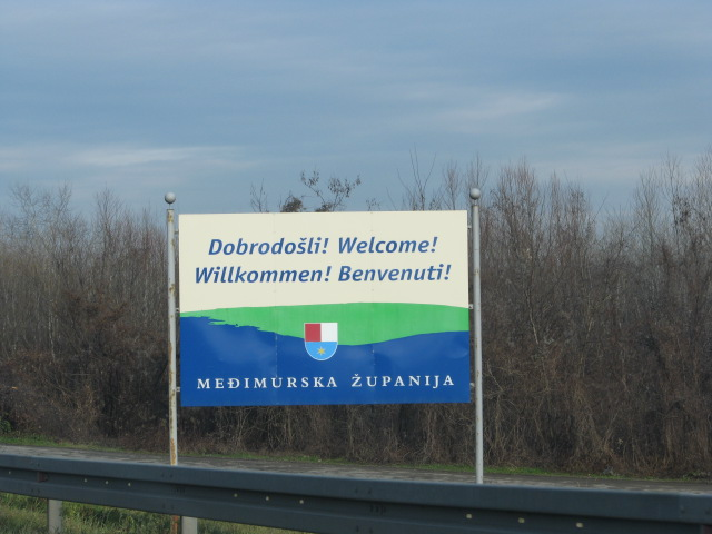 Dobrodošli Međimurska županija